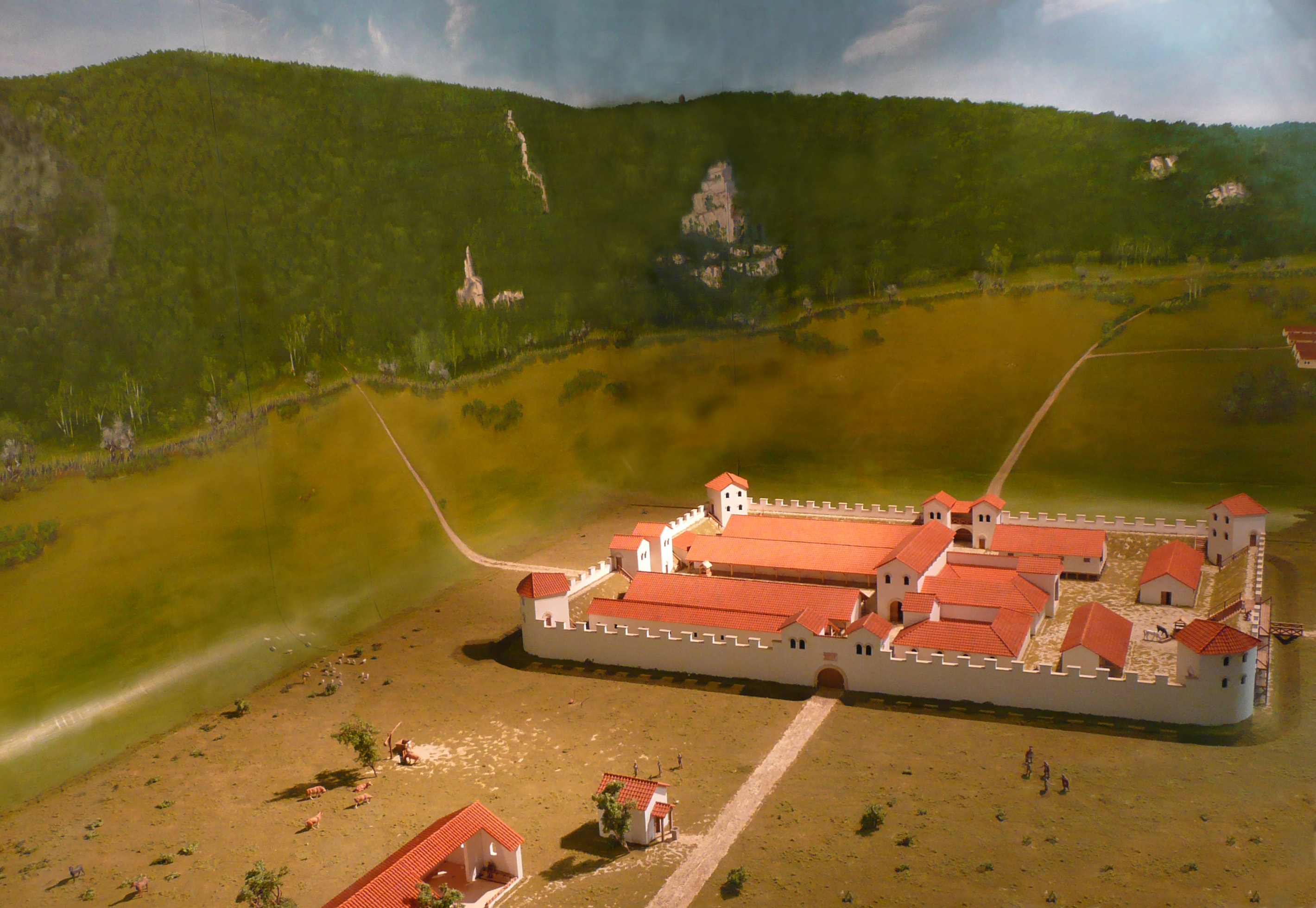 Modell des Römerkastells Böhming bei Kipfenberg in der Ansicht von Westen. Das Modell steht im Römer- und Bajuwarenmuseum in Kipfenberg.